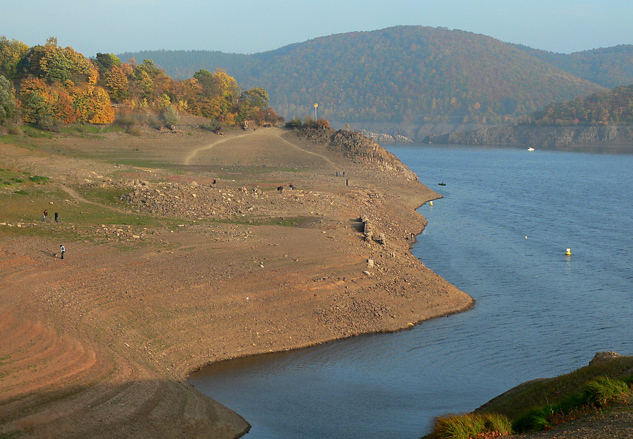 Dorfstelle Berich, bei Niedrigwasser, mit Resten der Klostergrundmauern rechts am Hang zum See